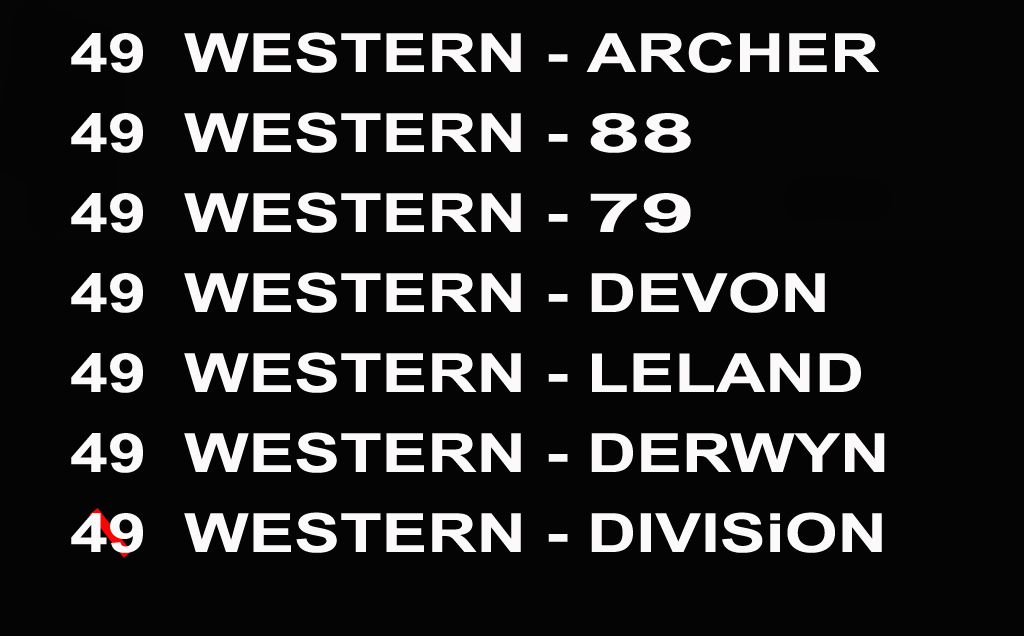 Zelfgemaakte media in Photoshop CS